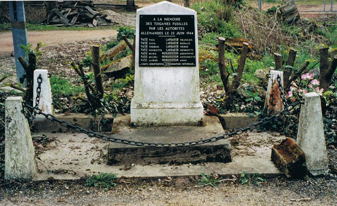 Stèle commémorative à la mémoire des Tziganes massacrés à Saint Sixte en 1944